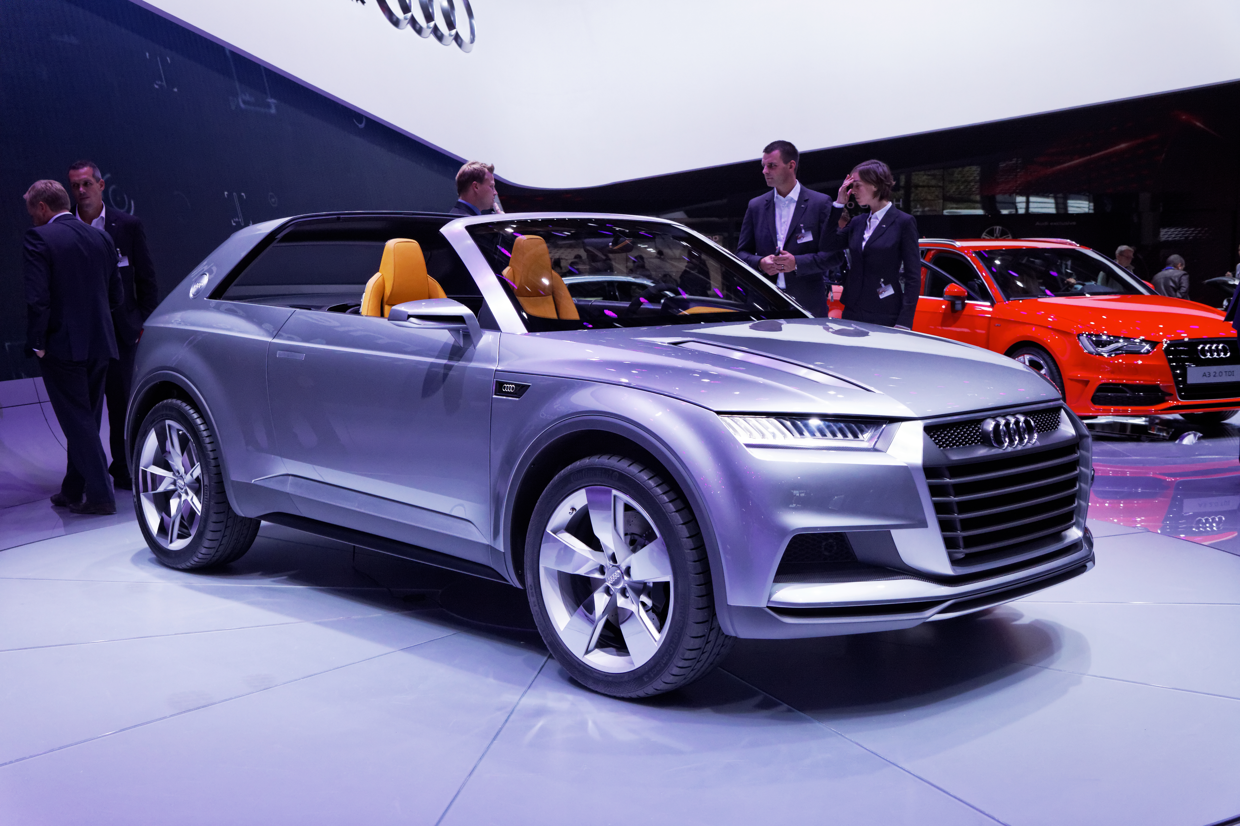 Une Audi Crosslane Coupe présentée lors du Mondial de l'Automobile de Paris 2012.